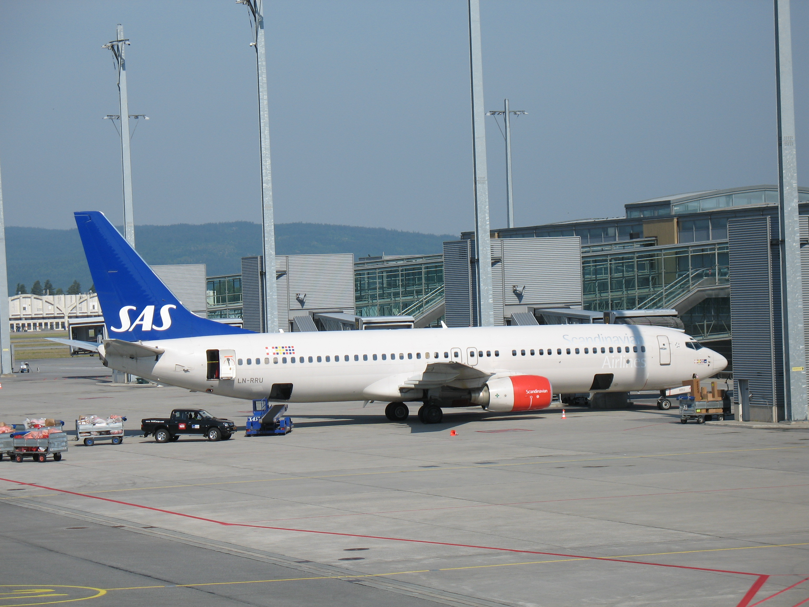 A SAS Boeing 737-883 at Oslo Airport Gardermoen, Norway